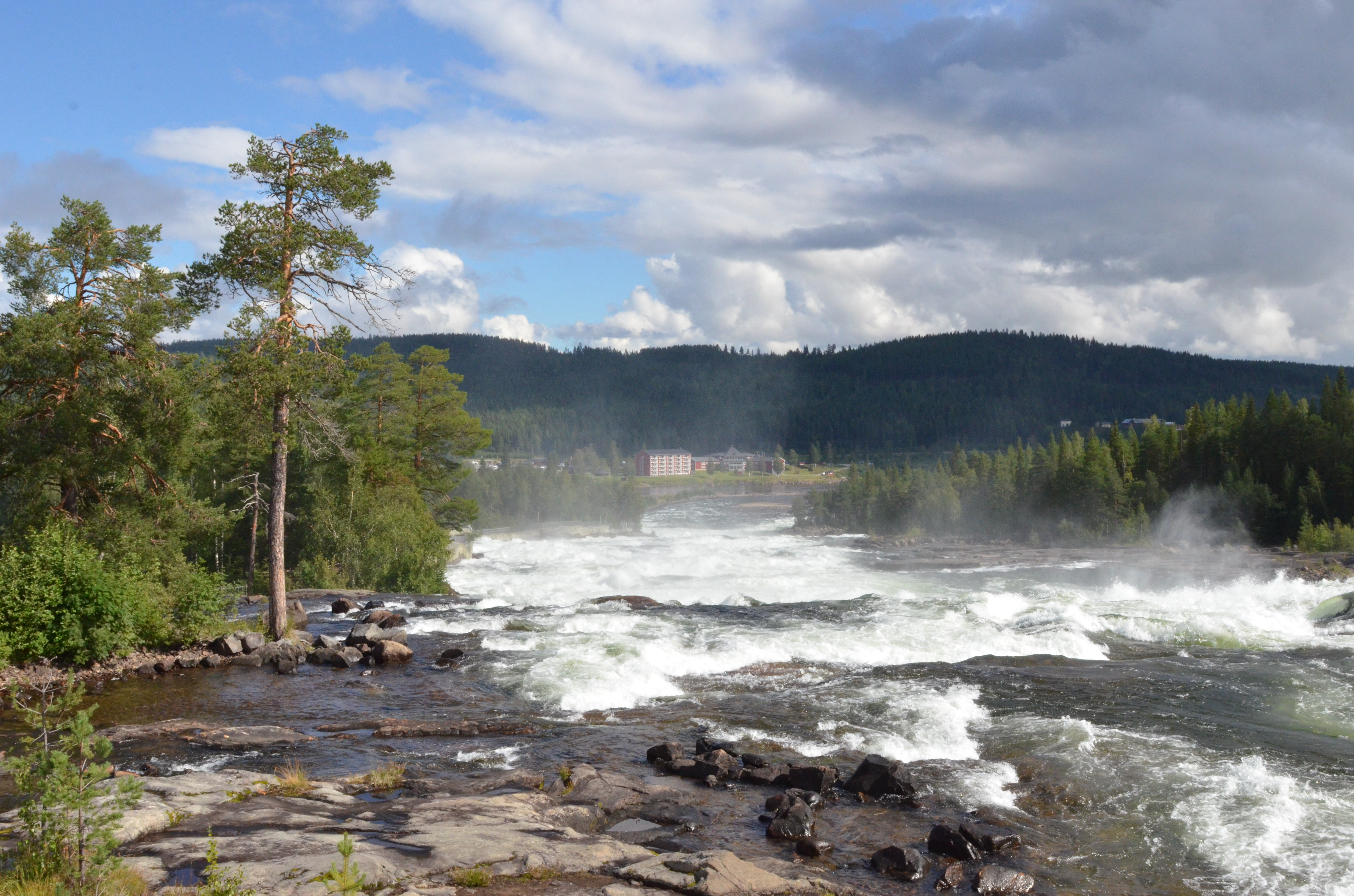 Storforsen.